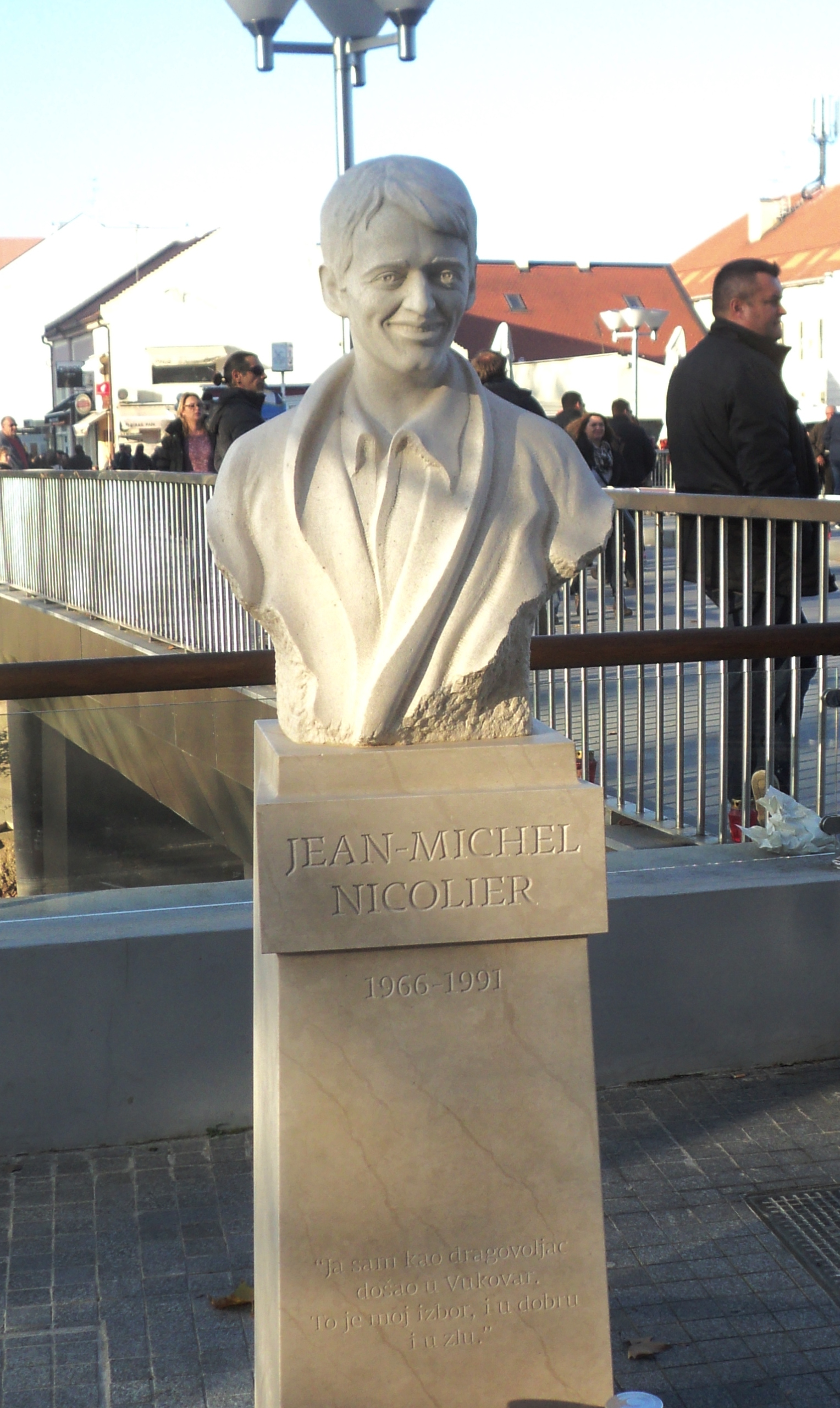 Jean -Michel Nicolier spomen poprsje u Vukovaru